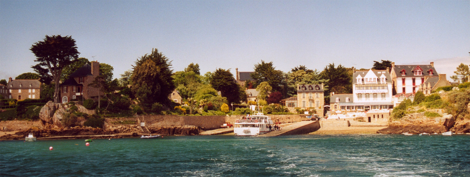 Bretagne Ile de Bréhat. Arrivée au Port Cros par la vedette de l'Arcouest. Auteur : GIRAUD Patrick